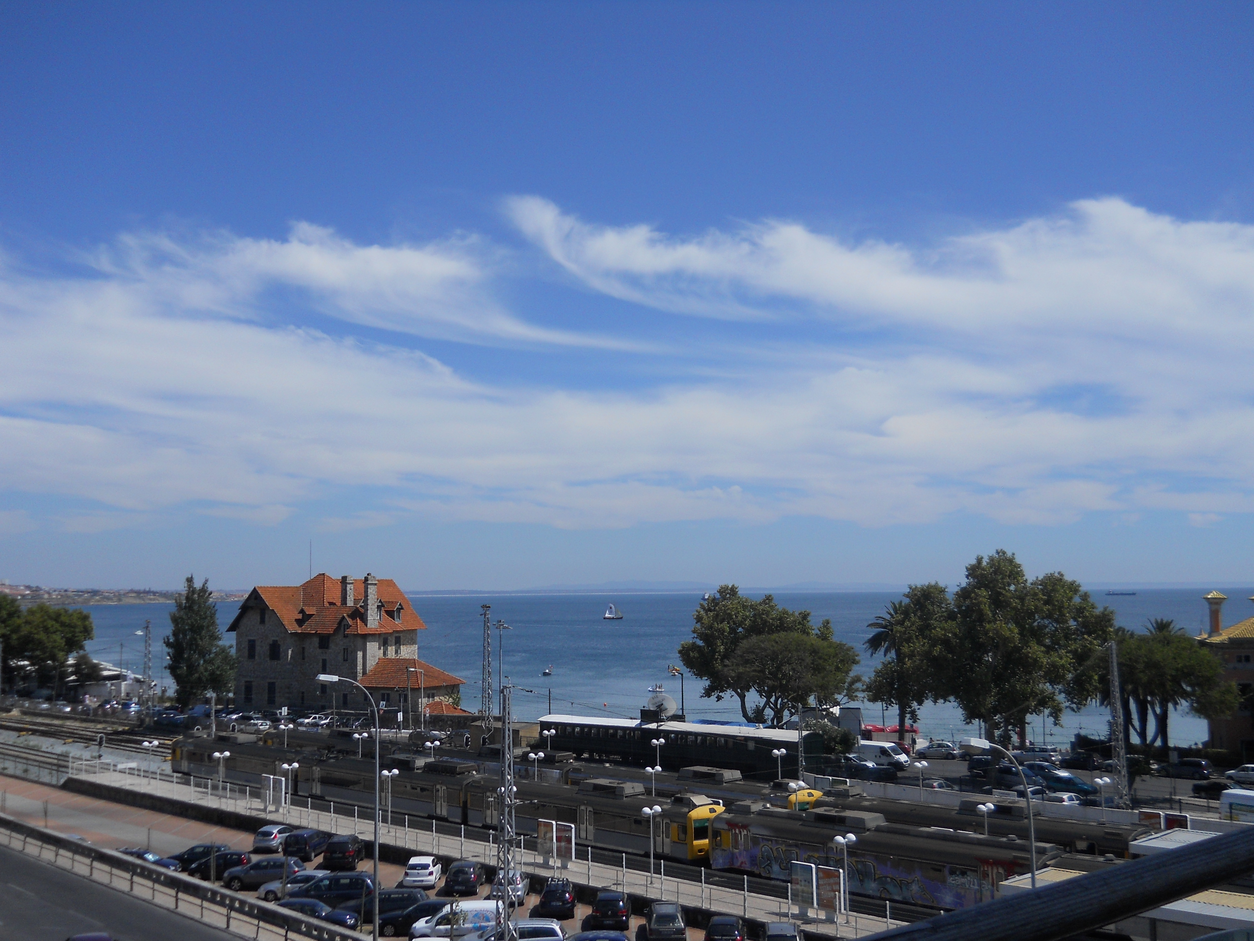 Évora Agosto 2011